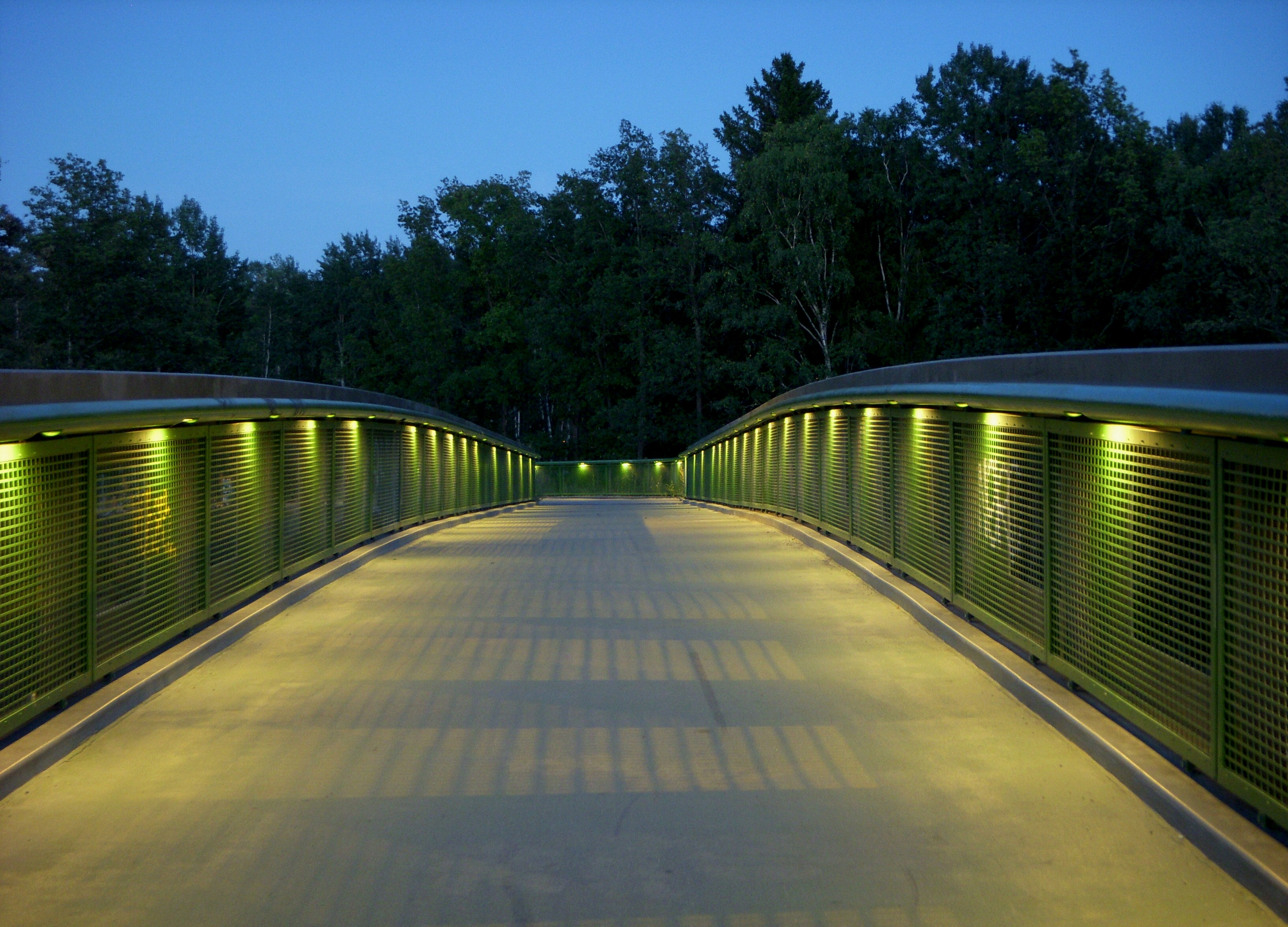 Modern indirekt belyning på gång- och cykelbro (Smistabron)